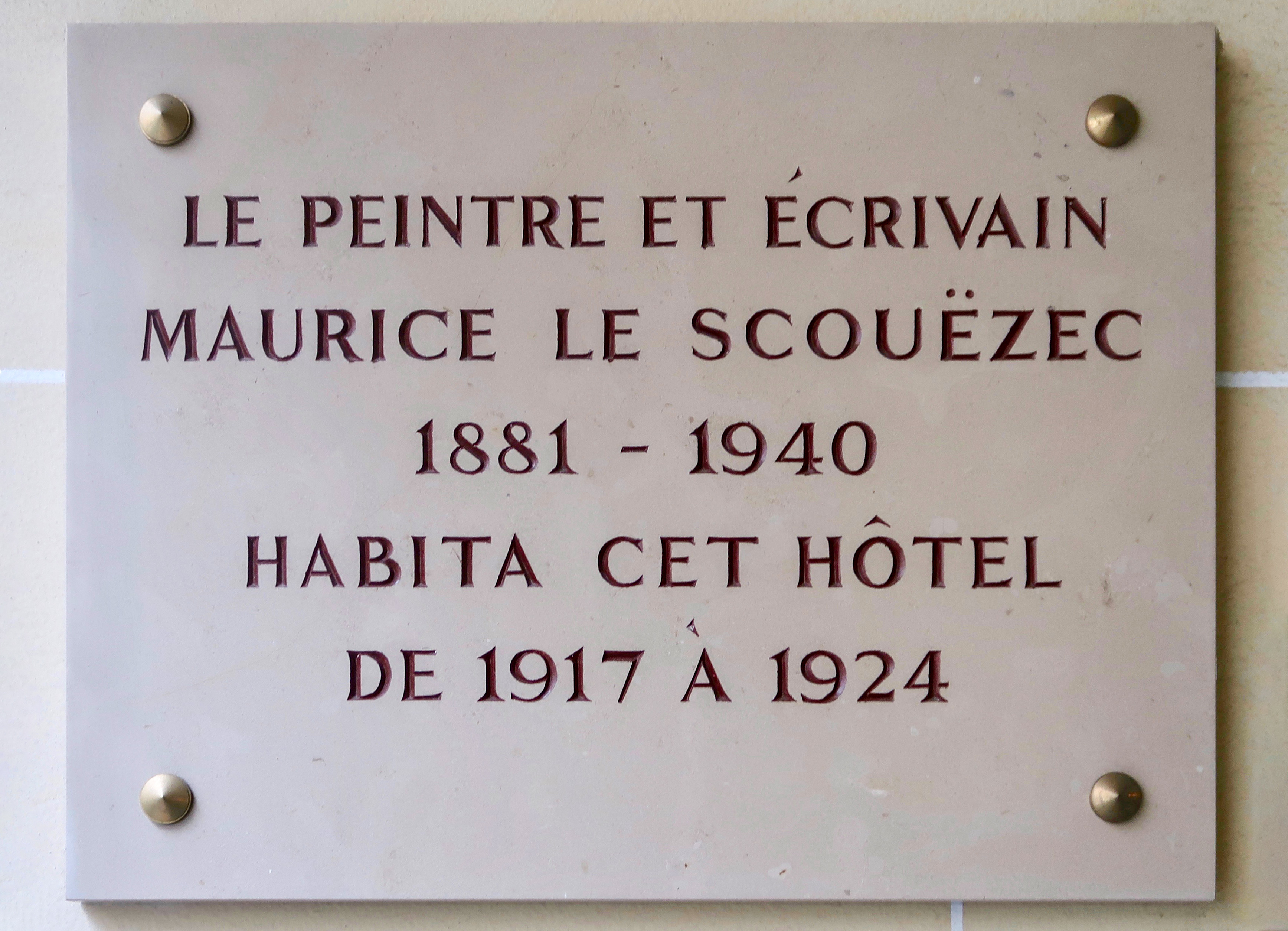 Plaque en hommage à Maurice Le Scouëzec, 35 rue Delambre (Paris, 14e).